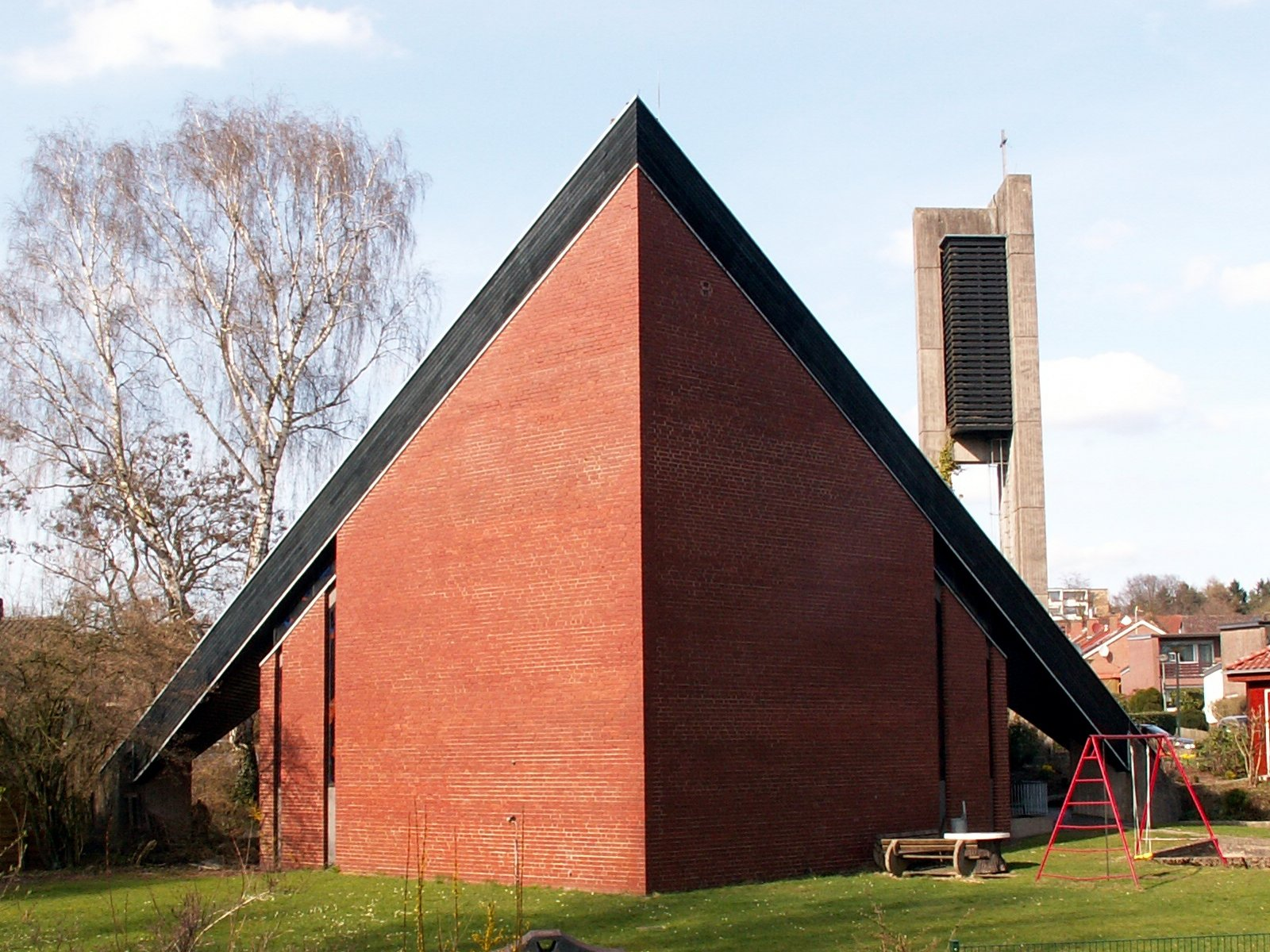 ev. Stephanuskirche in Osnabrück, Stadtteil Atter, Ansicht von Süden